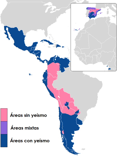 Yeísmo en América